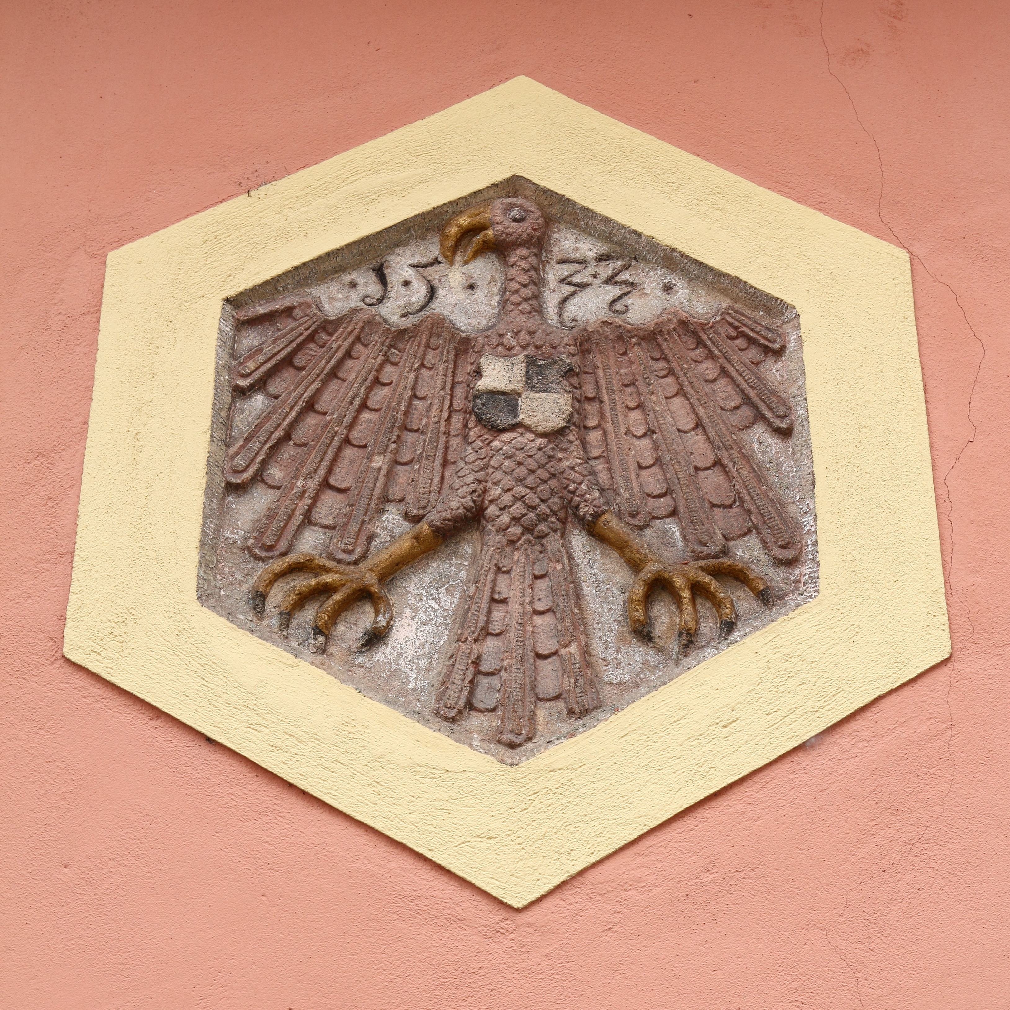 Roth - Hauptstraße 14 - Detail (Altes Rathaus. Zweigeschossiger Mansarddachbau im Ansbacher Rokoko, 1758/59.)